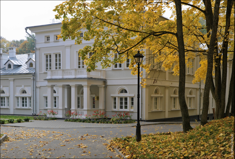 Жыліцкі палац